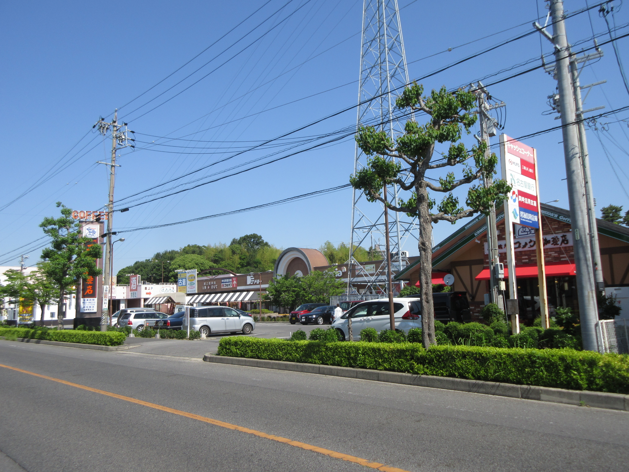 レスパ（岡崎市若松町）